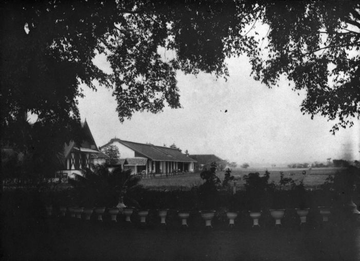 Foto. Het ziekenhuis te Modjowarno, Oost-Java, gezien vanaf het huis van mr. Kats.